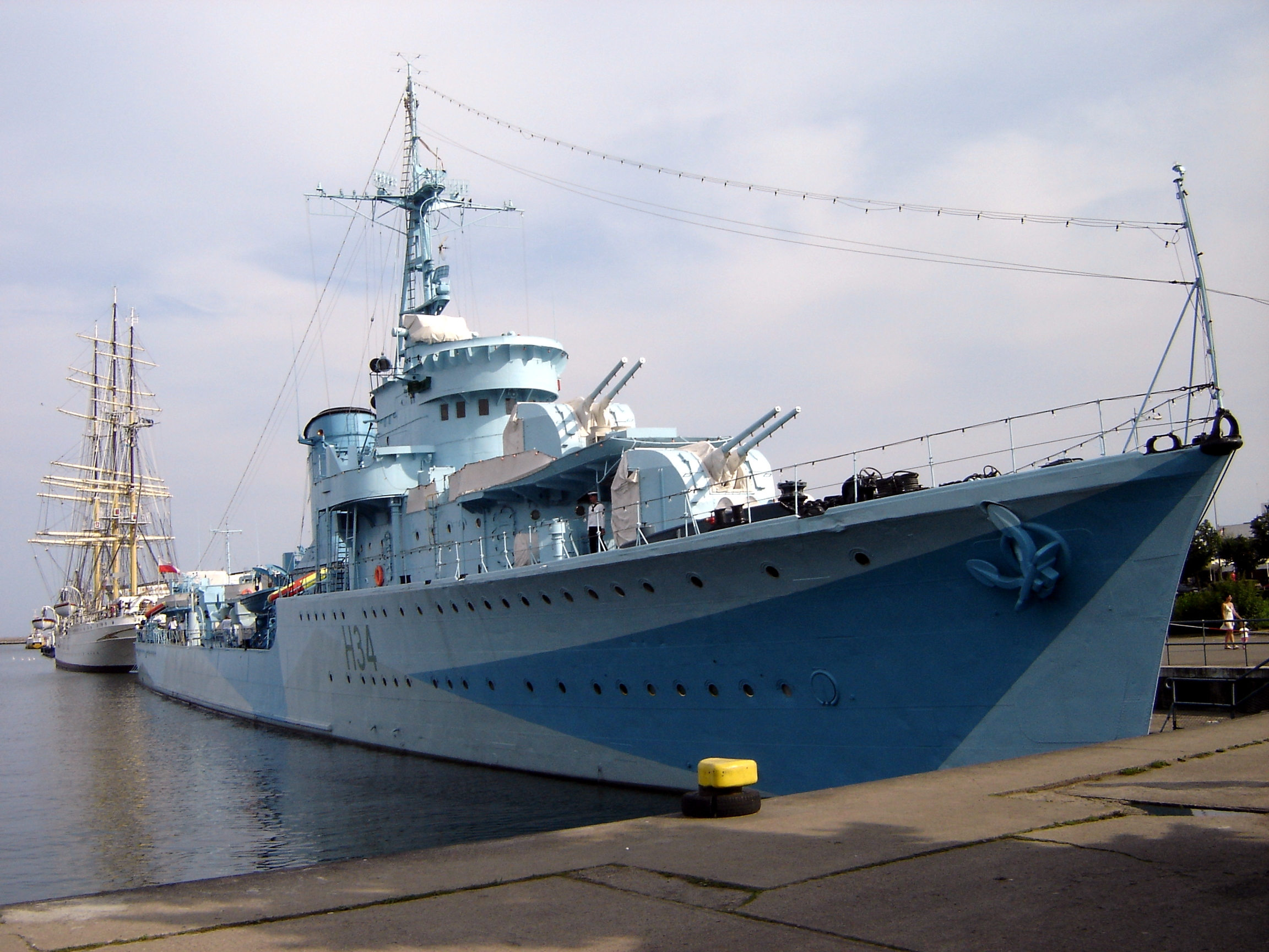 ORP Błyskawica